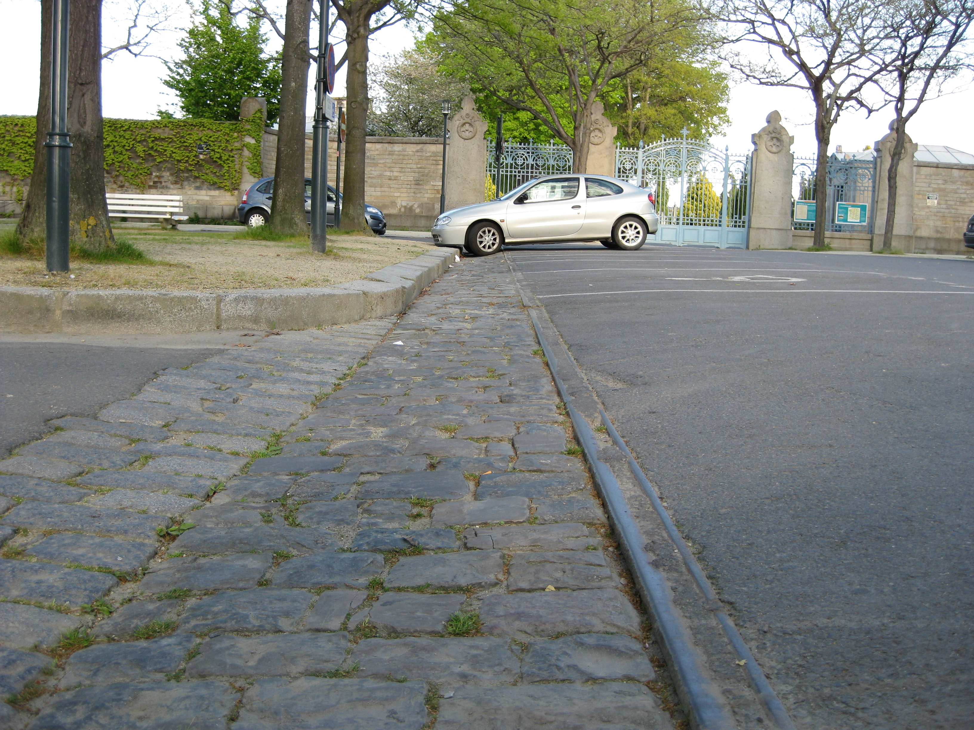 Vestige du tramway de Rennes. Terminus au Cimetière de l'Est